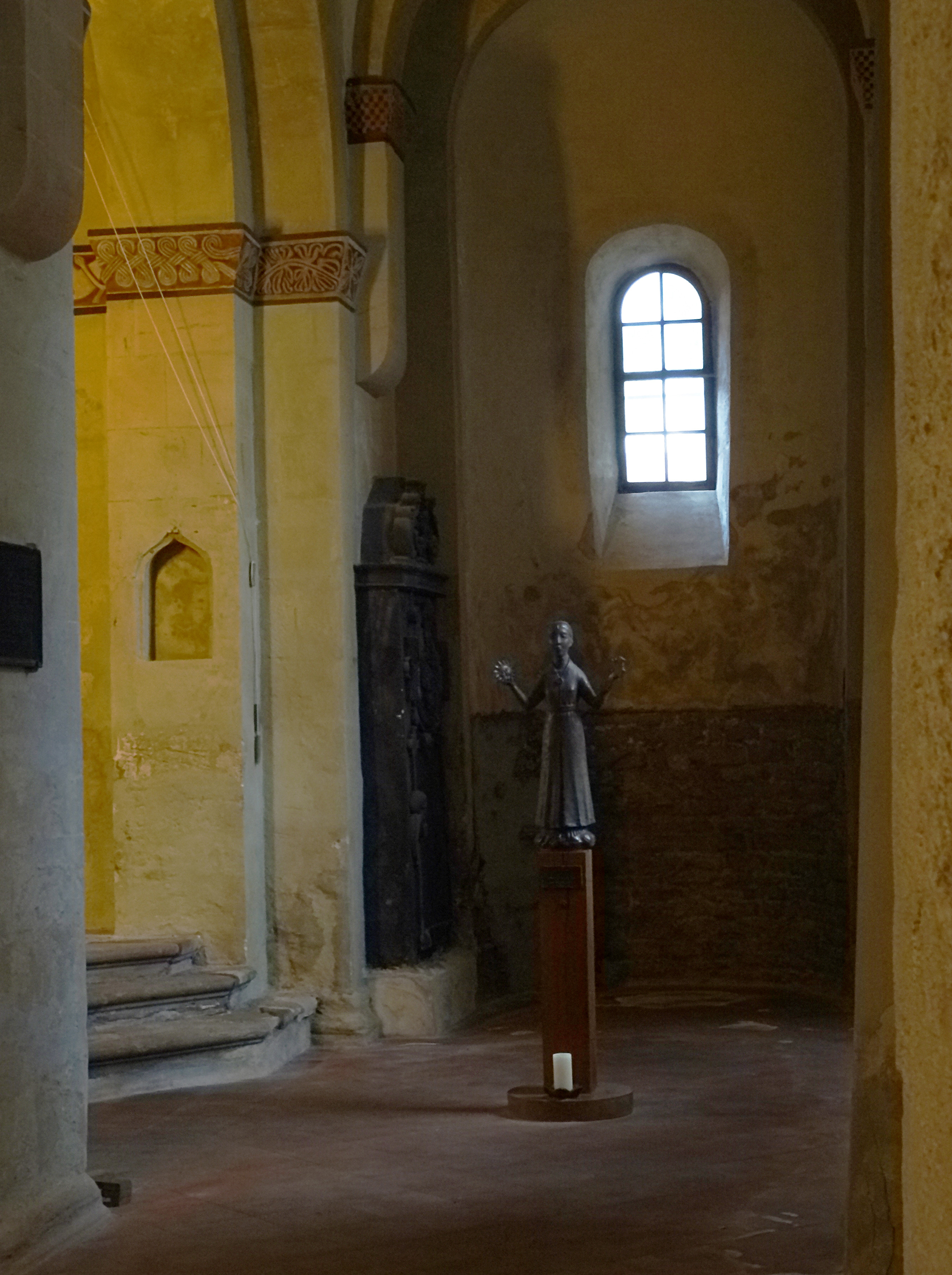 Sankt Ulrici (Sangerhausen), Heilige Jutta von Sangerhausen